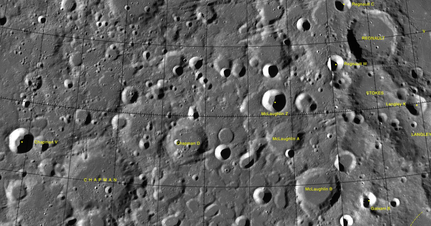 Cráter Chapman (LRO)